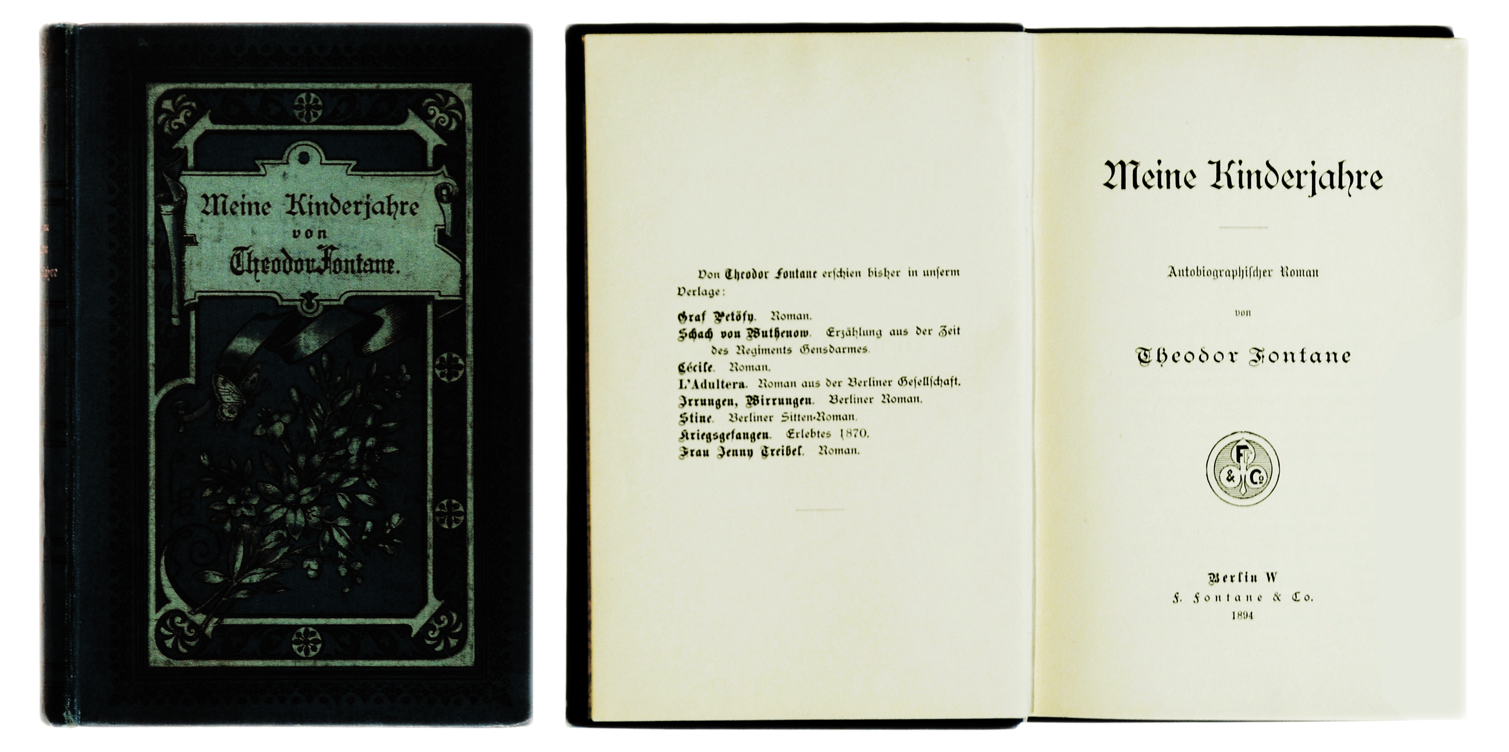 Titelblatt der ersten Buchausgabe